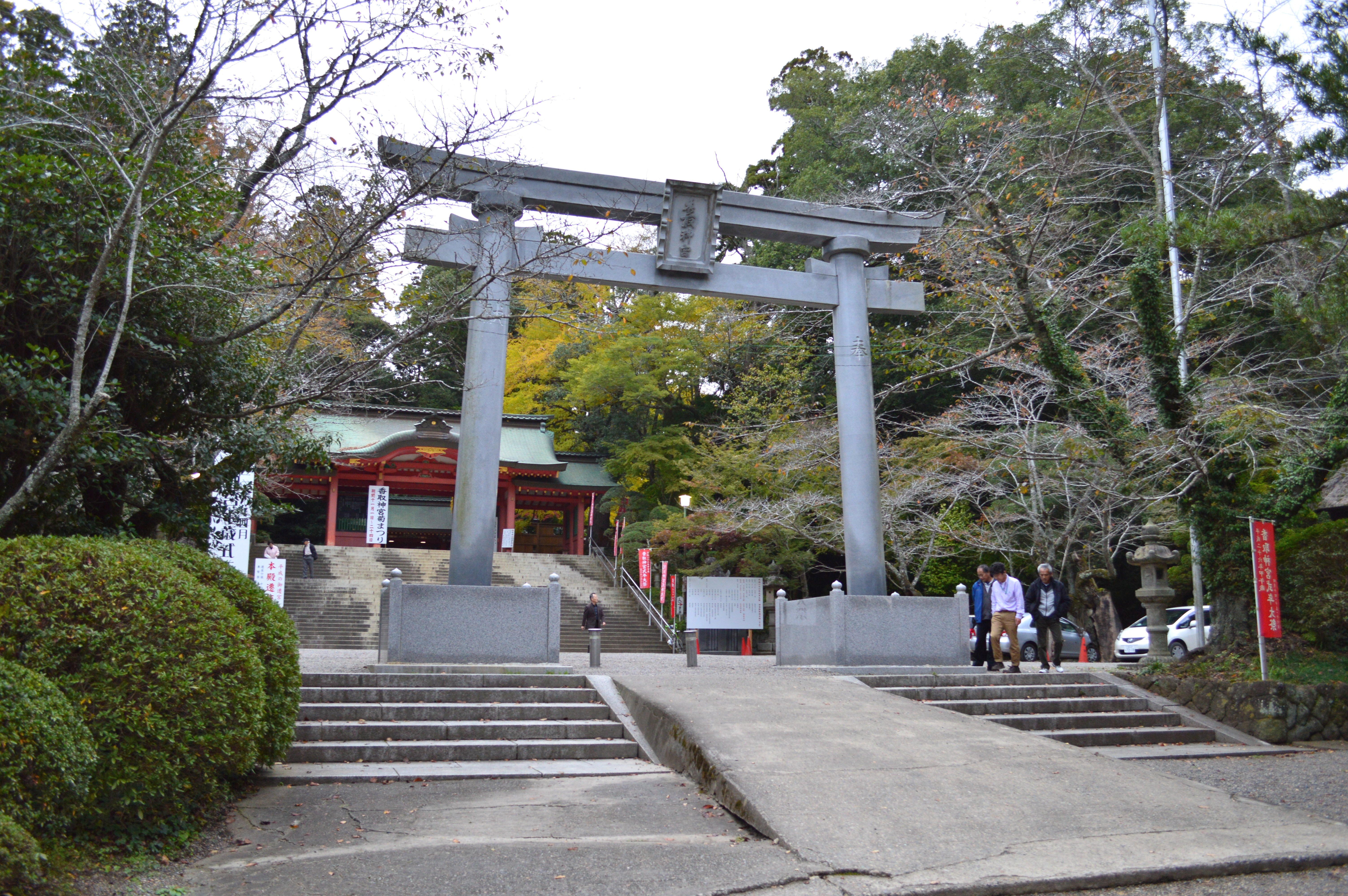 香取神宮 三の鳥居